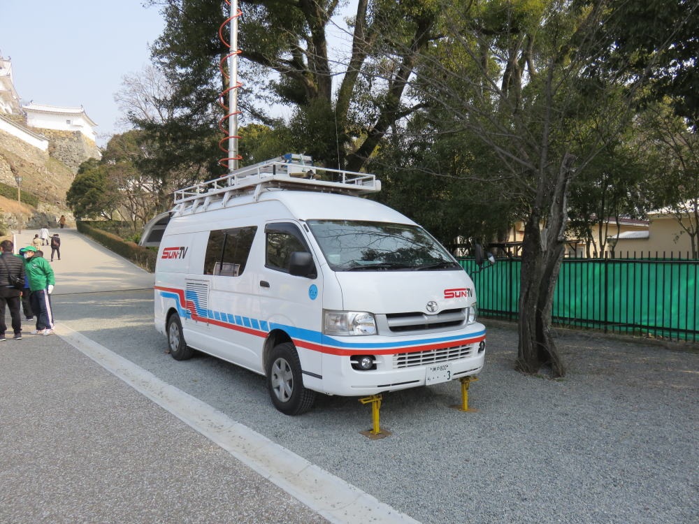 サンテレビのトヨタ・ハイエース小型中継車。姫路城マラソン。